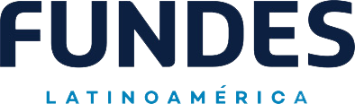 Logo de Fundes Latinoamérica